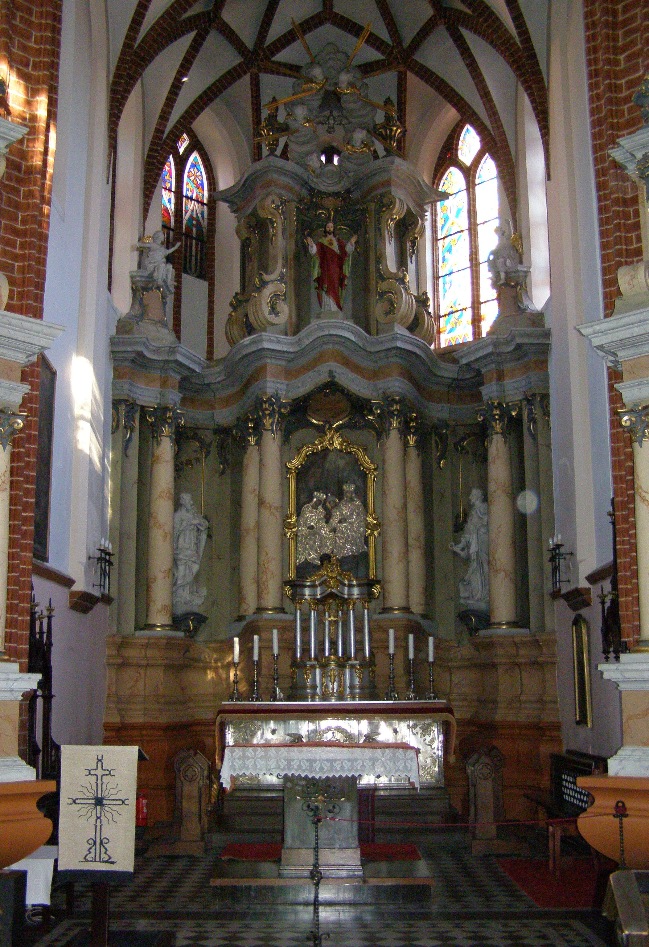 Prezbiterium kościola św. Anny w Wilnie